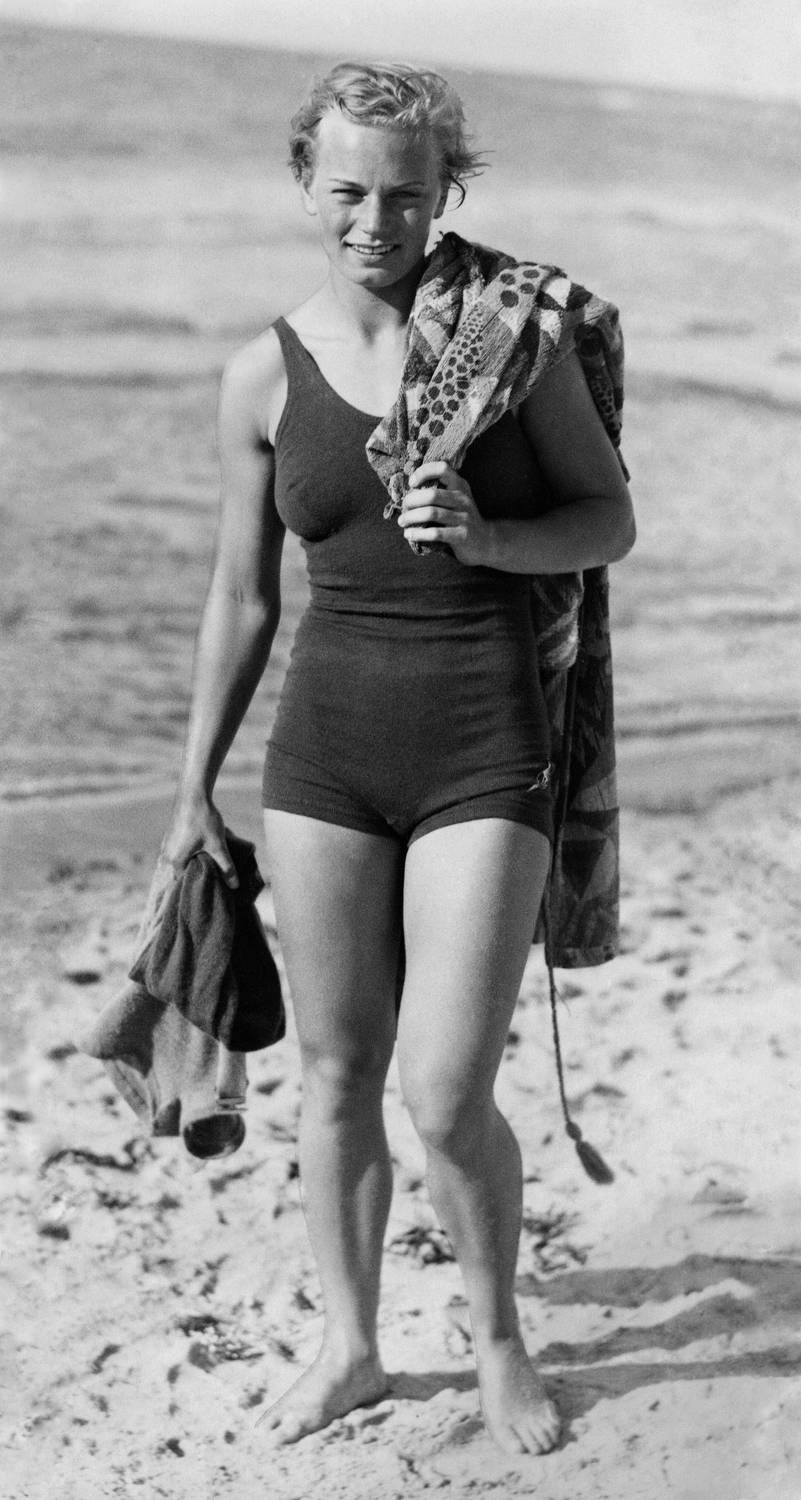 Ingrid Larsen